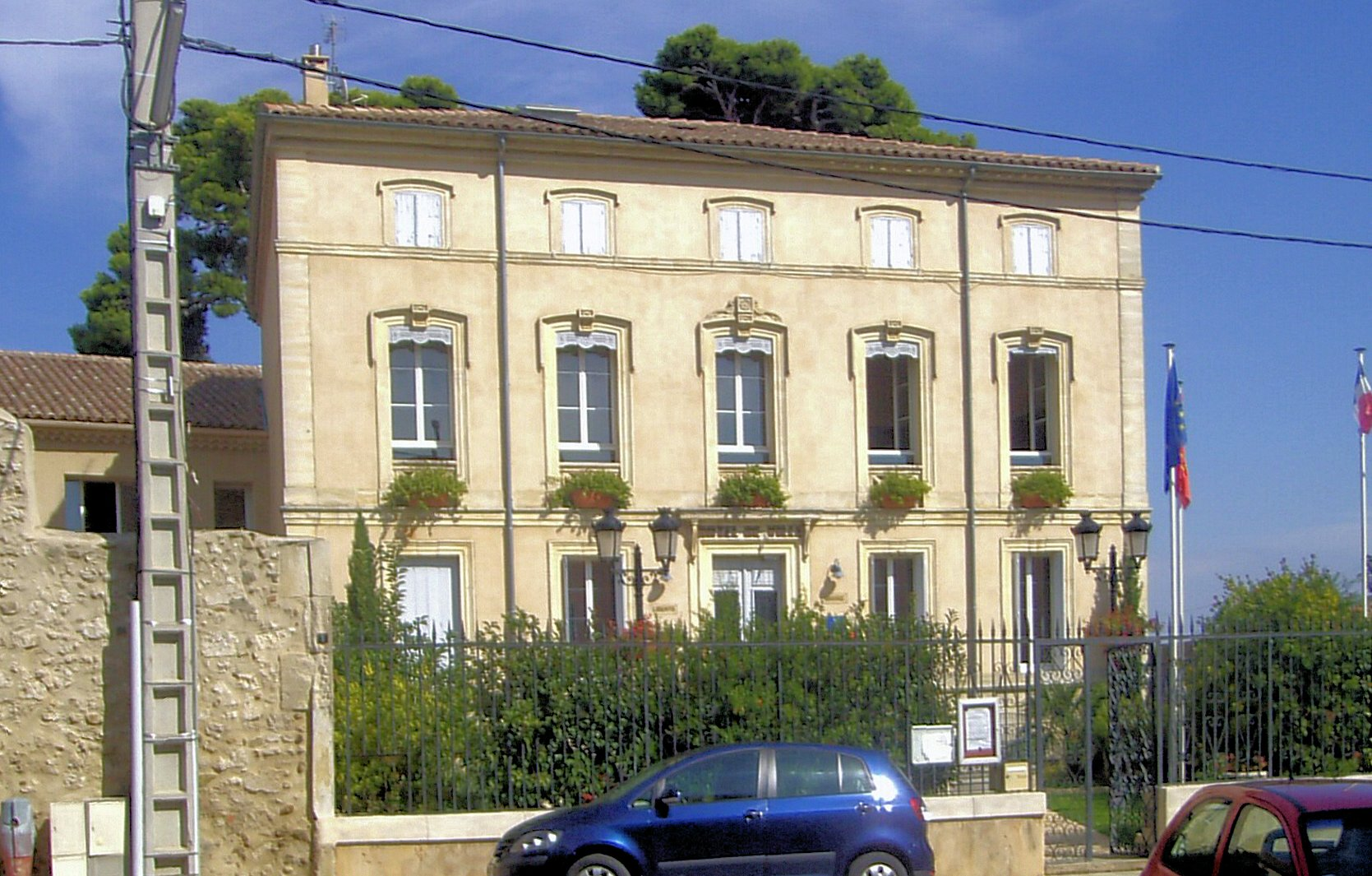 L'hôtel de ville d'Argeliers